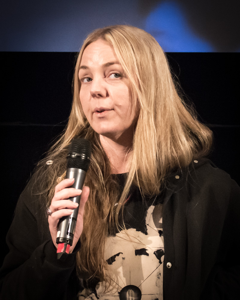 Fia-Stina Sandlund under presentationen av den Svenska filmhösten i Filmhuset i Stockholm den 17 augusti 2015.